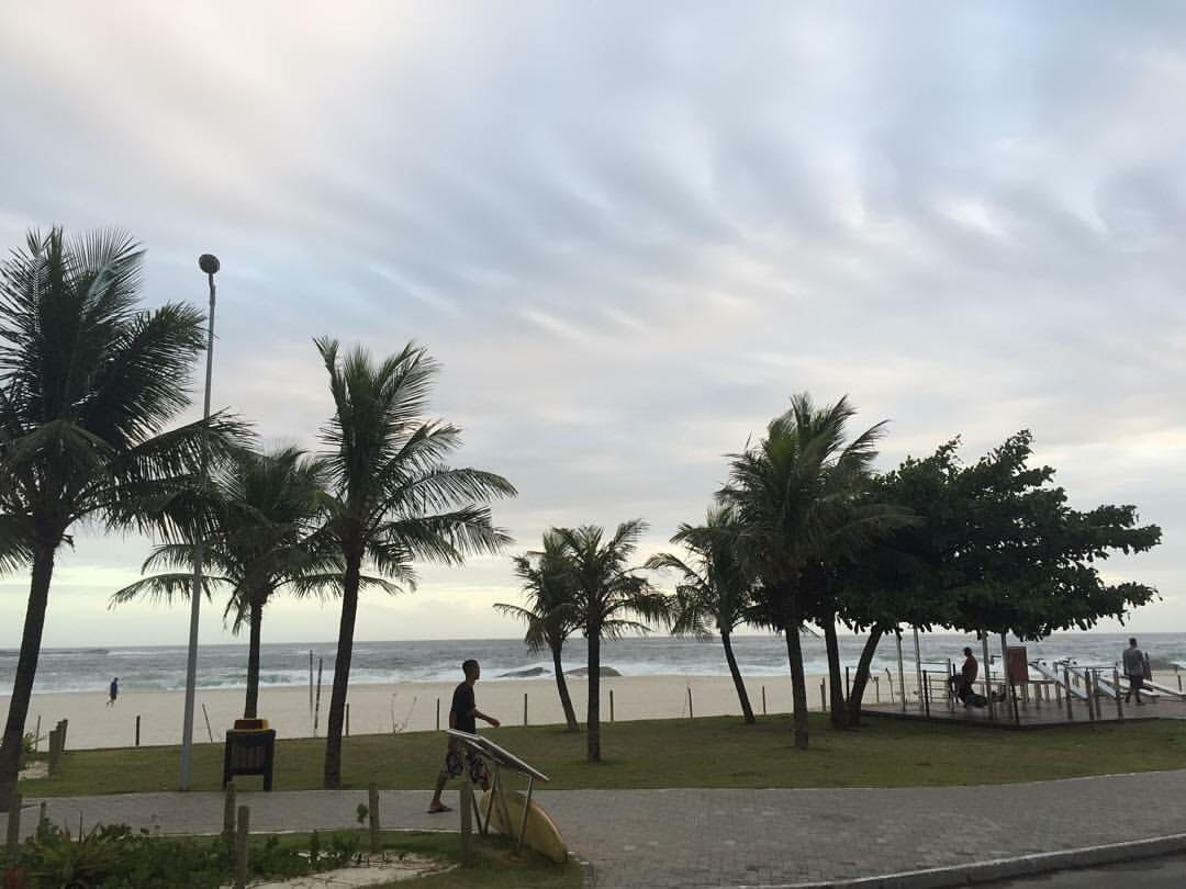 Orla de Itaúna, em Saquarema.